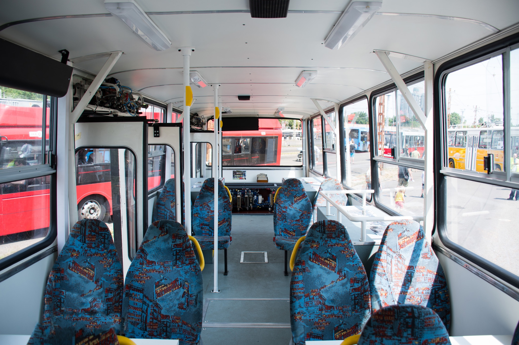 A BKV Zrt. Ikarus 263T oktató trolibusza a kőbányai garázs szakmai nyílt napján